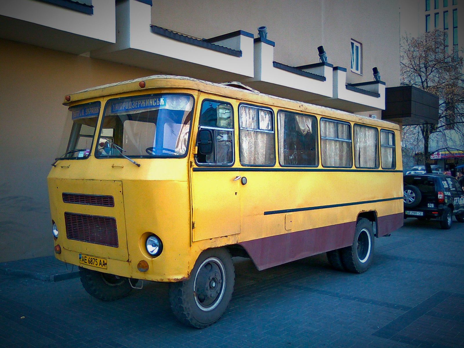 Советский автобус "Кубань" Г1А1-02 в центре Днепропетровска, 2012 год.